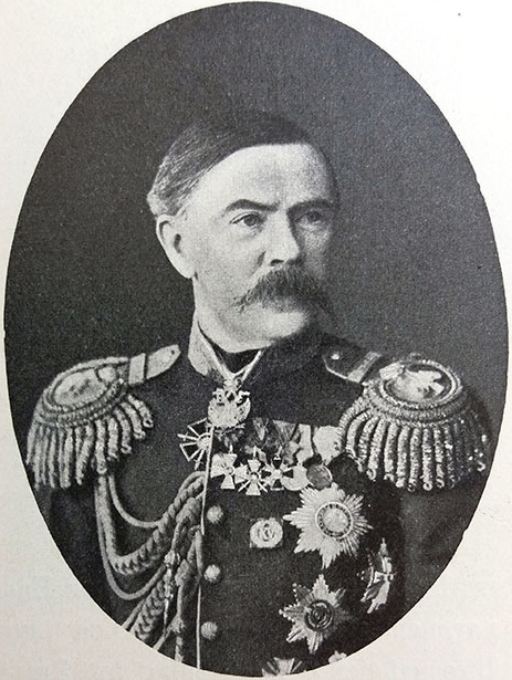 Генерал-адъютант граф Фёдор Логгинович Гейден